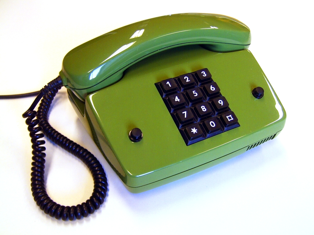 FeTAp 756D-1 (Telefon mit Datentaste), Hersteller Hagenuk Kiel, Baujahr 6.83 Interne Bestellnummer der Deutschen Bundespost: KNr 121 675 624-1 TAE